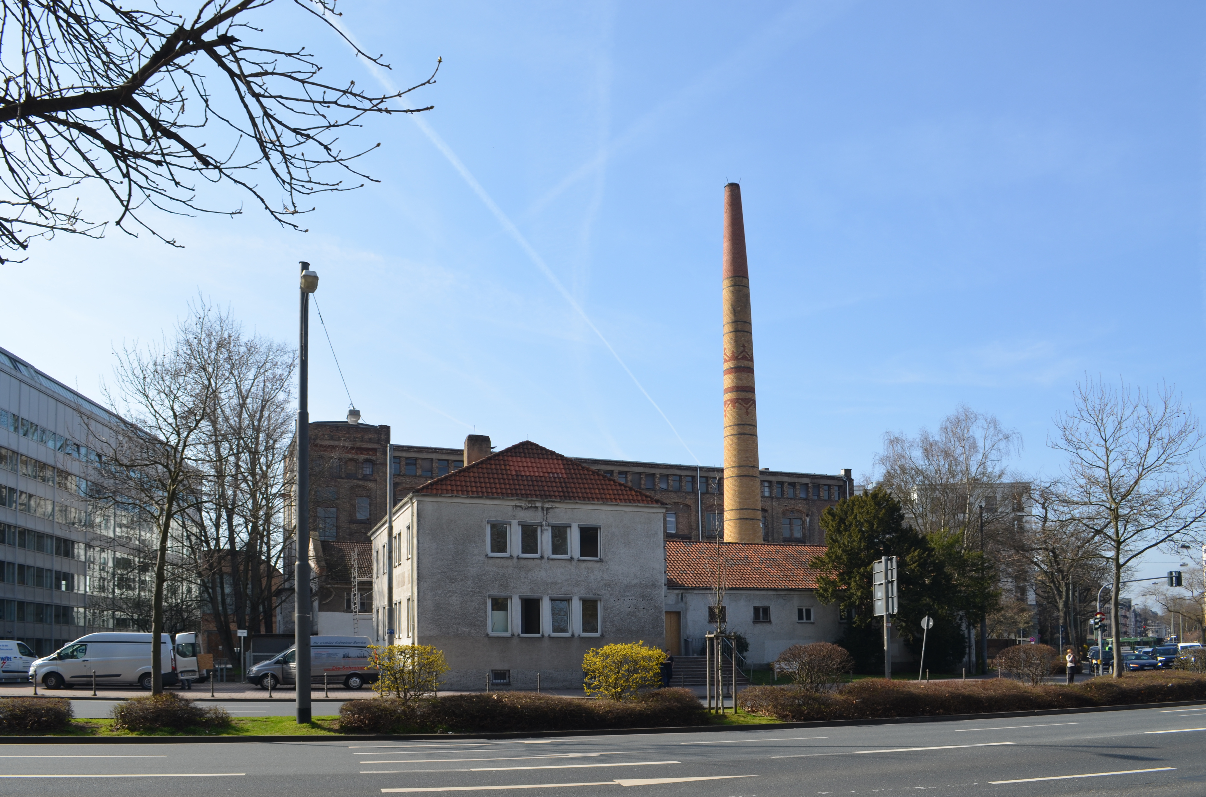 Frankfurt, Dondorfsche Druckerei